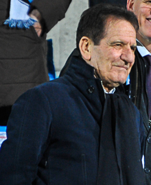 Mario Macalli (presidente Lega Italiana Calcio Professionistico) in tribuna allo Stadio comunale Città di Gorgonzola durante la partita di calcio Giana Erminio-Unione Venezia, valida per il campionato di Lega Pro 2014-2015